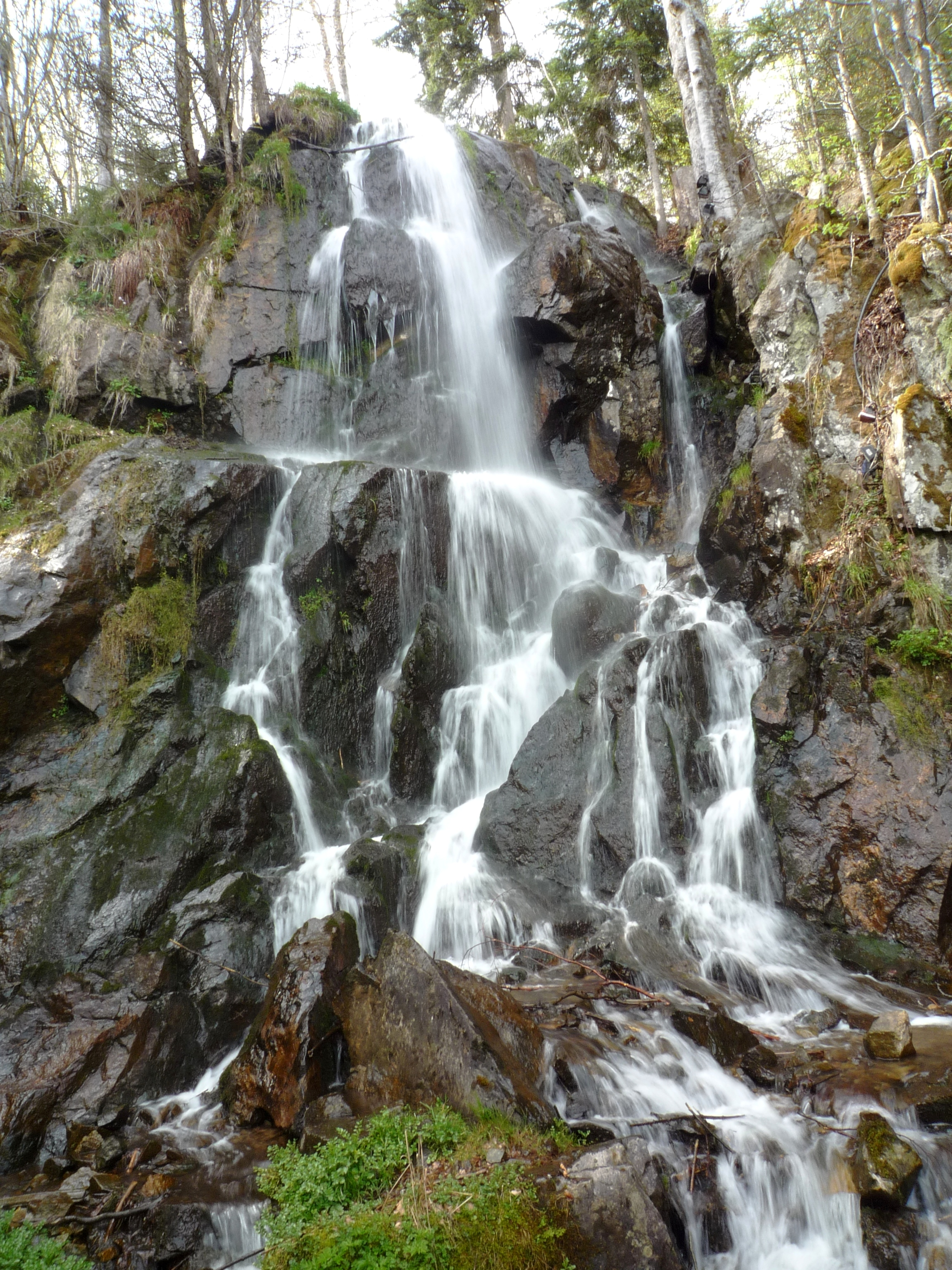 Le Hohwald - Cascade du Creuzweg - Hohwalder Wasserfall - Cascade de l'Andlau